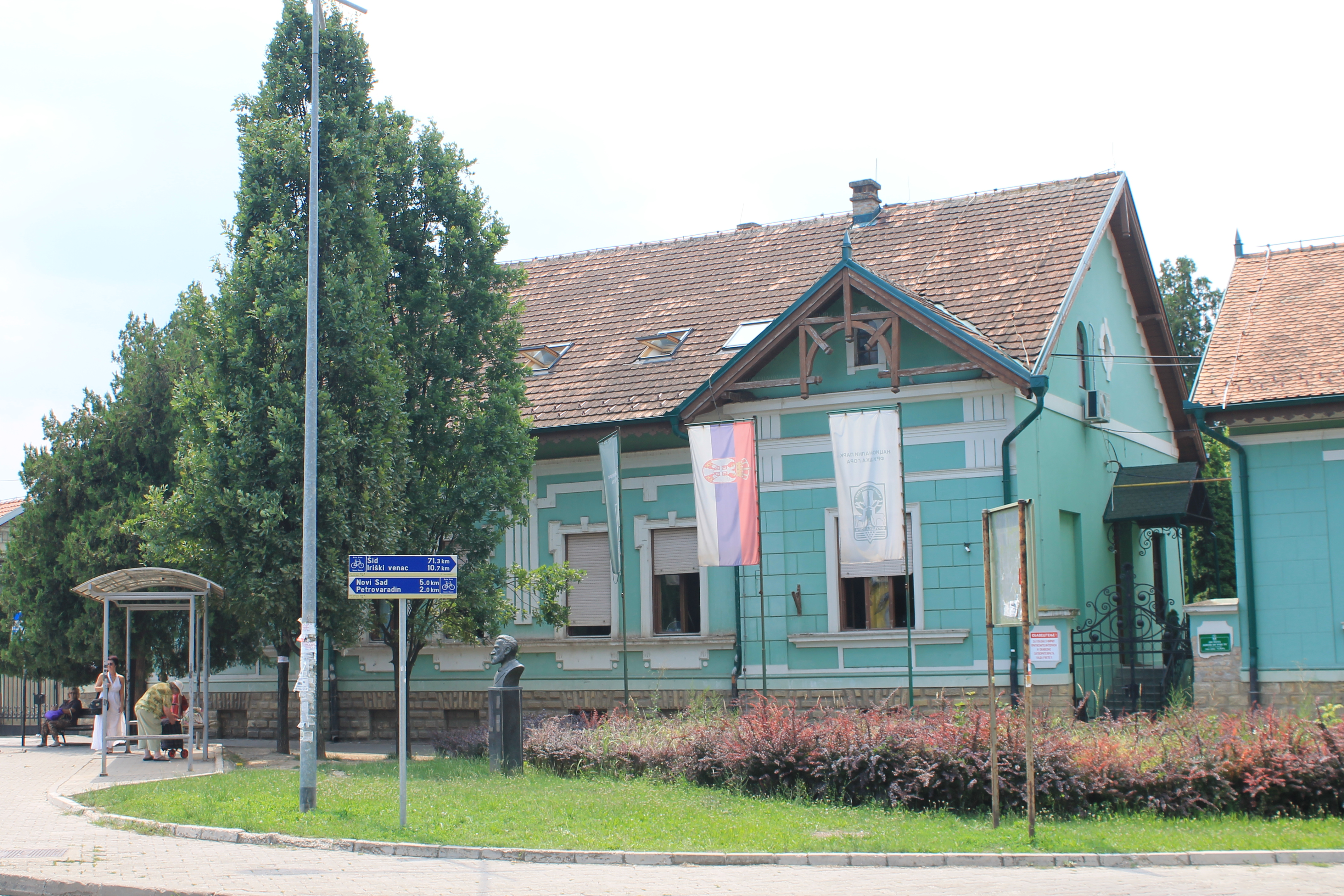 Zgrada NP Fruška gora, Sremska Kamenica